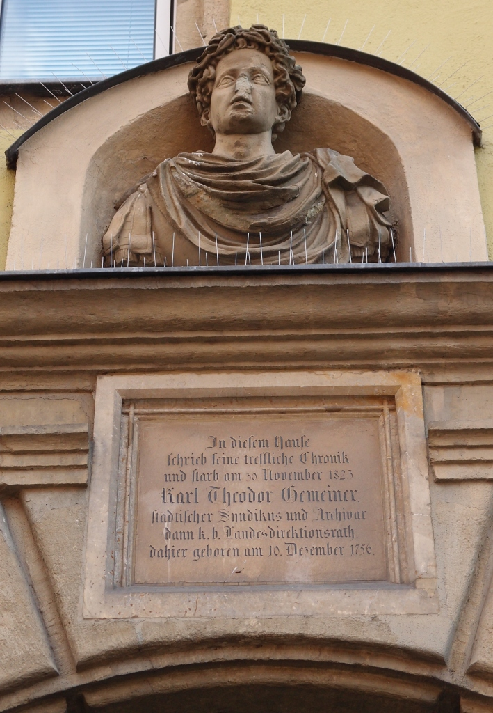 Gedenktafel für den deutschen Historiker Carl Theodor Gemeiner (* 10. Dezember 1756 in Regensburg; † 30. November 1823 ebenda) in Regensburg, Keplerstraße 11.